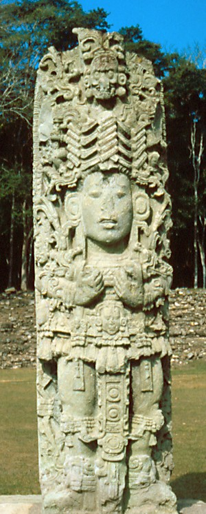 Maya beeld in Copán, Honduras (eigen foto, 1980)